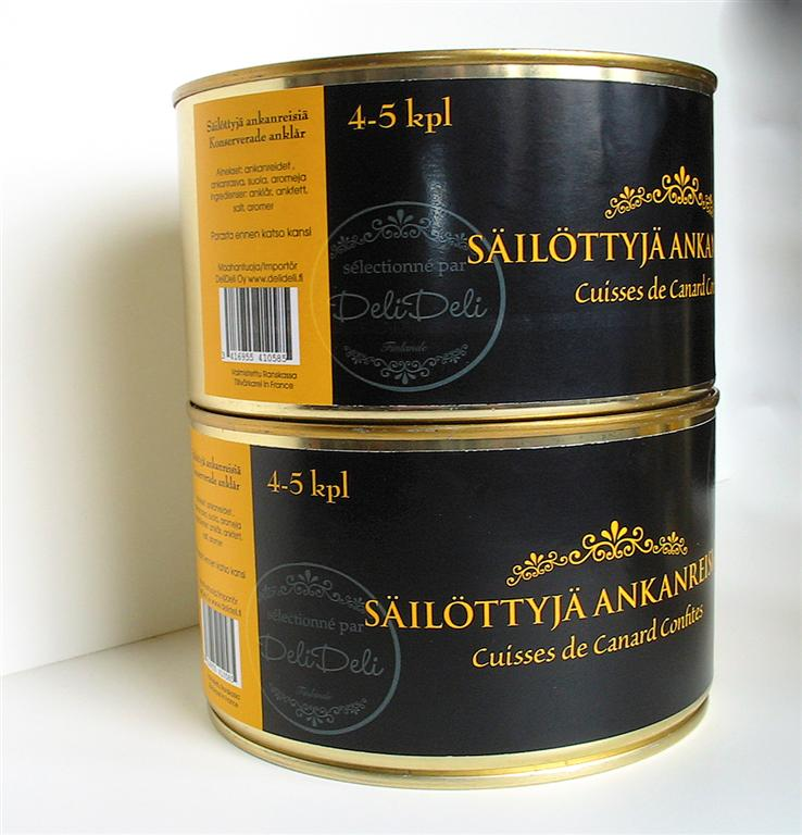 Säilykepurkki